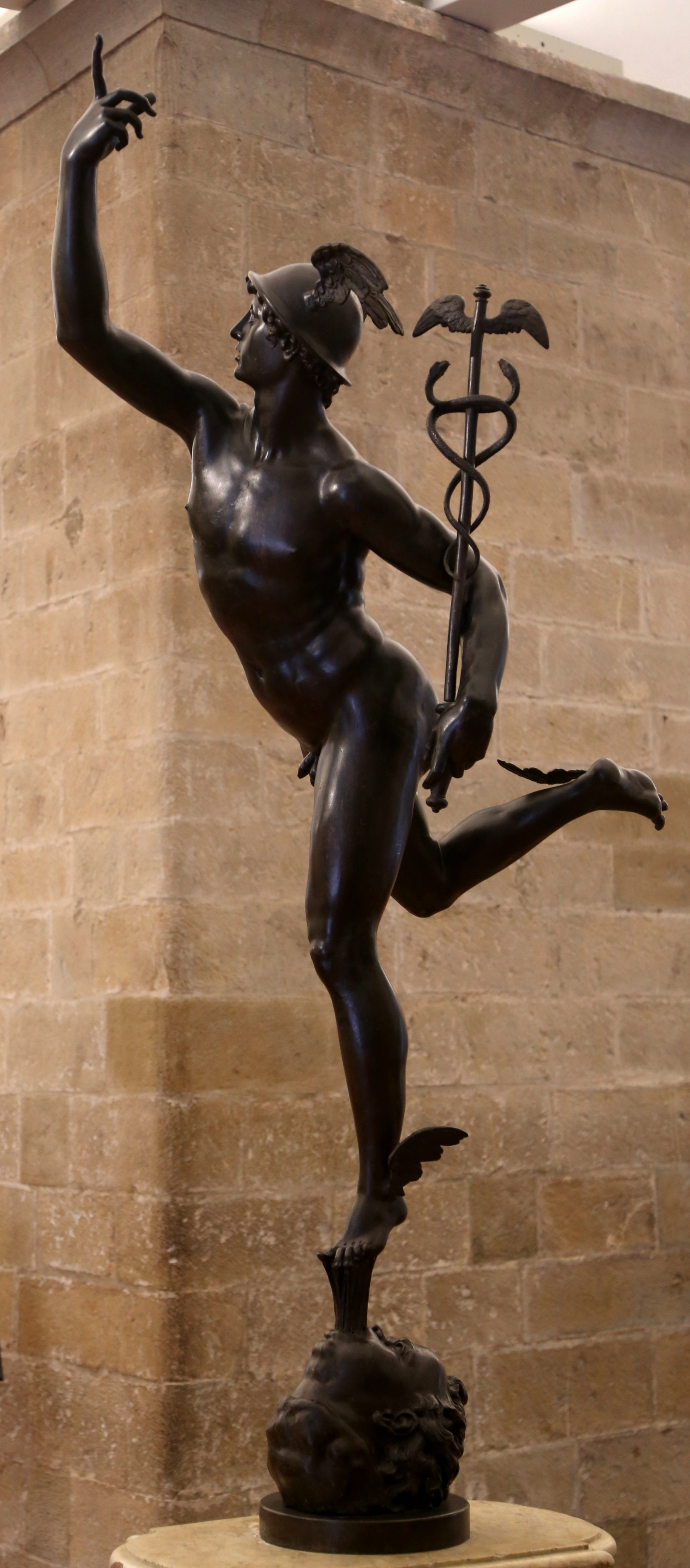 Mercurio volante, Giambologna, Museo del Bargello, Florenz